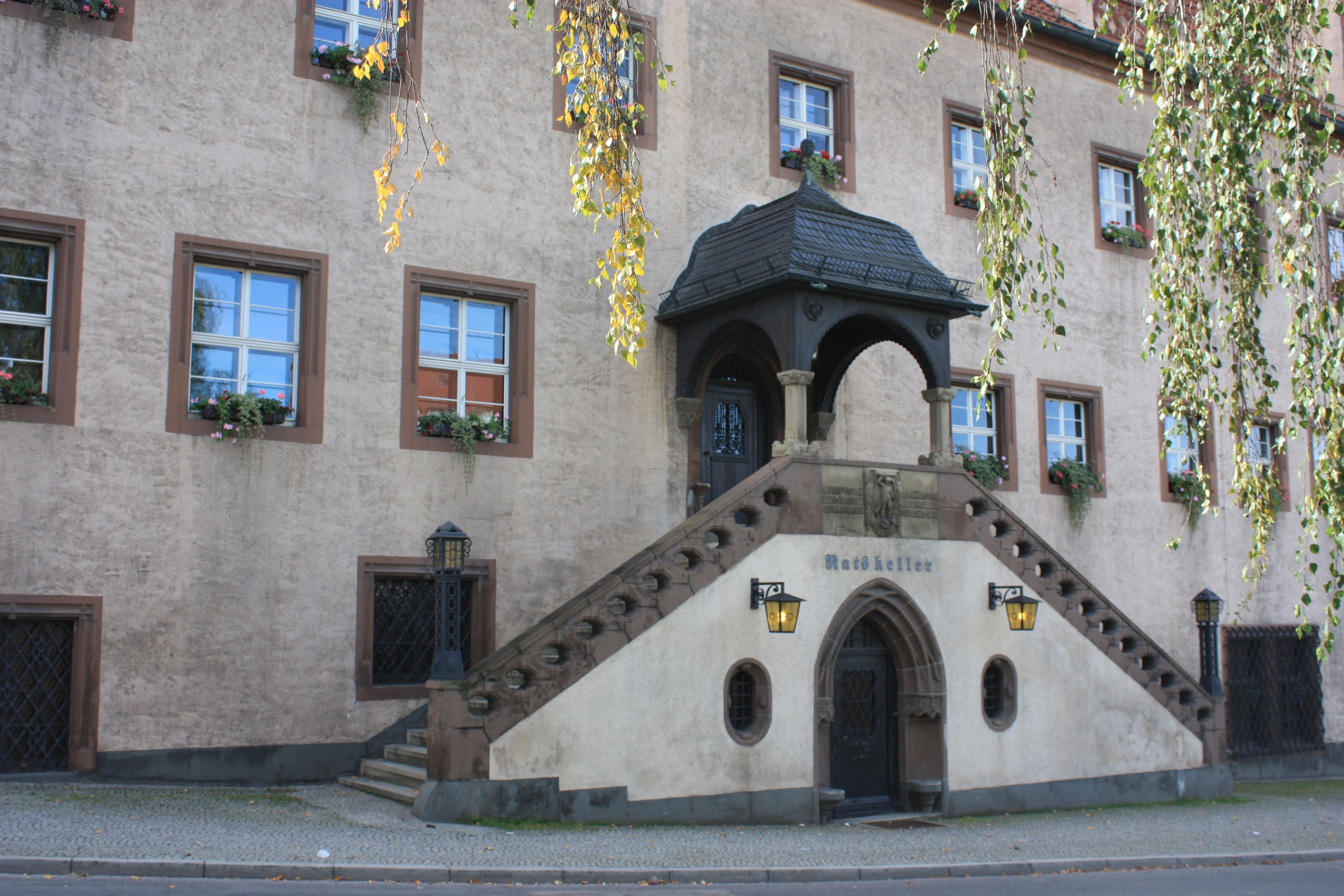 Zeitz, Altmarkt 1, Rathaus - Zugang zum Ratskeller. Das Rathaus ist ein Bau aus der Gründerzeit - eingeweiht in 1909, Aufnahme 2010